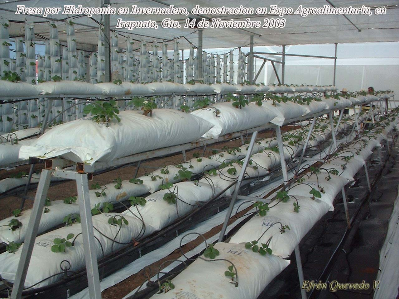 El cultivo de fresa cultivado en Hidroponia